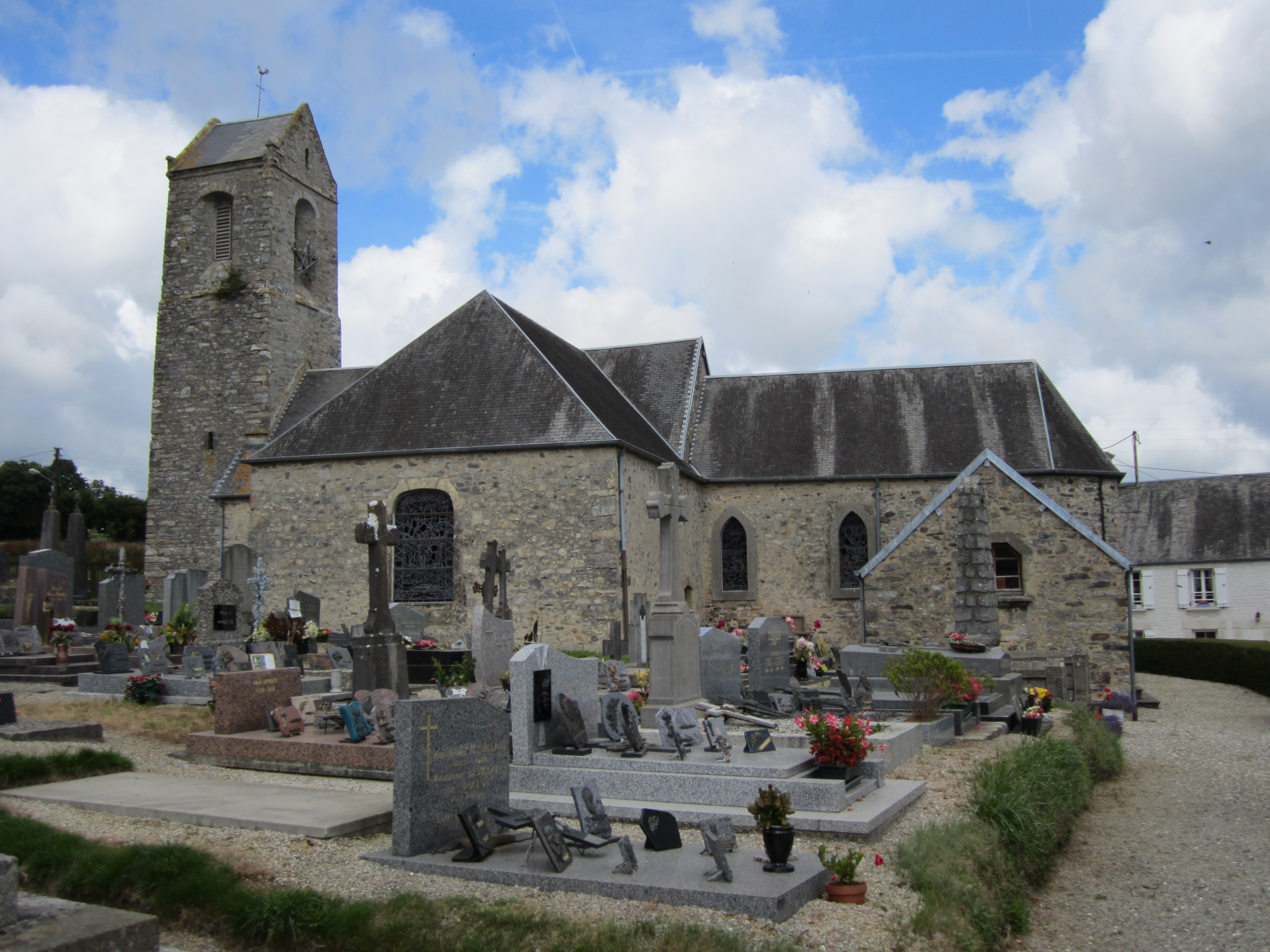 église Saint-Pierre de Camprond